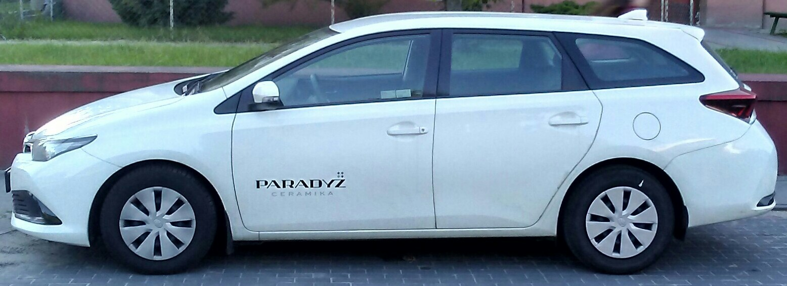 Samochód handlowca Ceramiki Paradyż, największego przedsiebiorstwa w Tomaszowie Mazowieckim w województwie łódzkim, 2018 rok